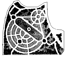 Rosarium Sangerhausen, plan from F.E. Doerr